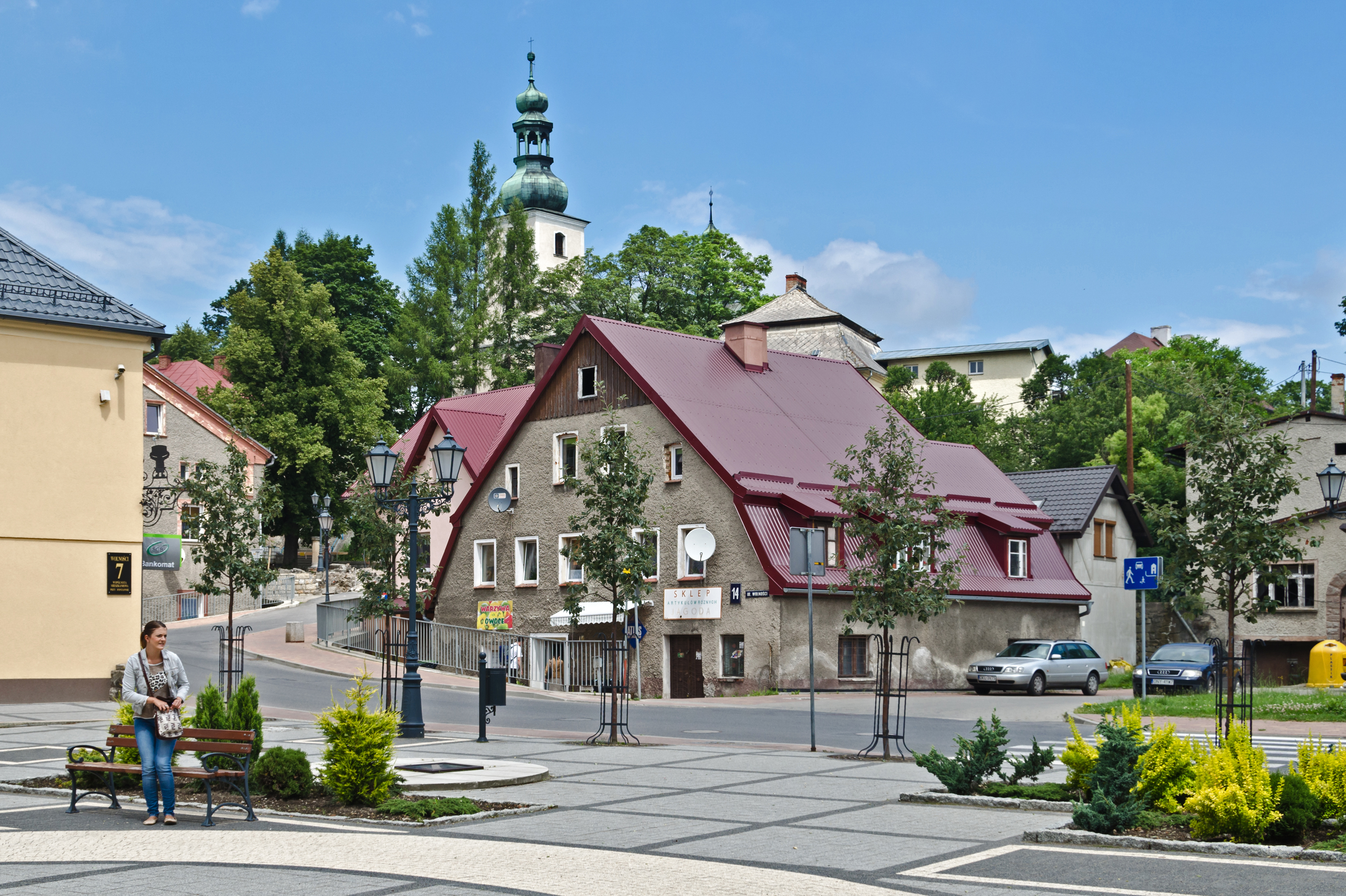 Szczytna, ul. Wolności